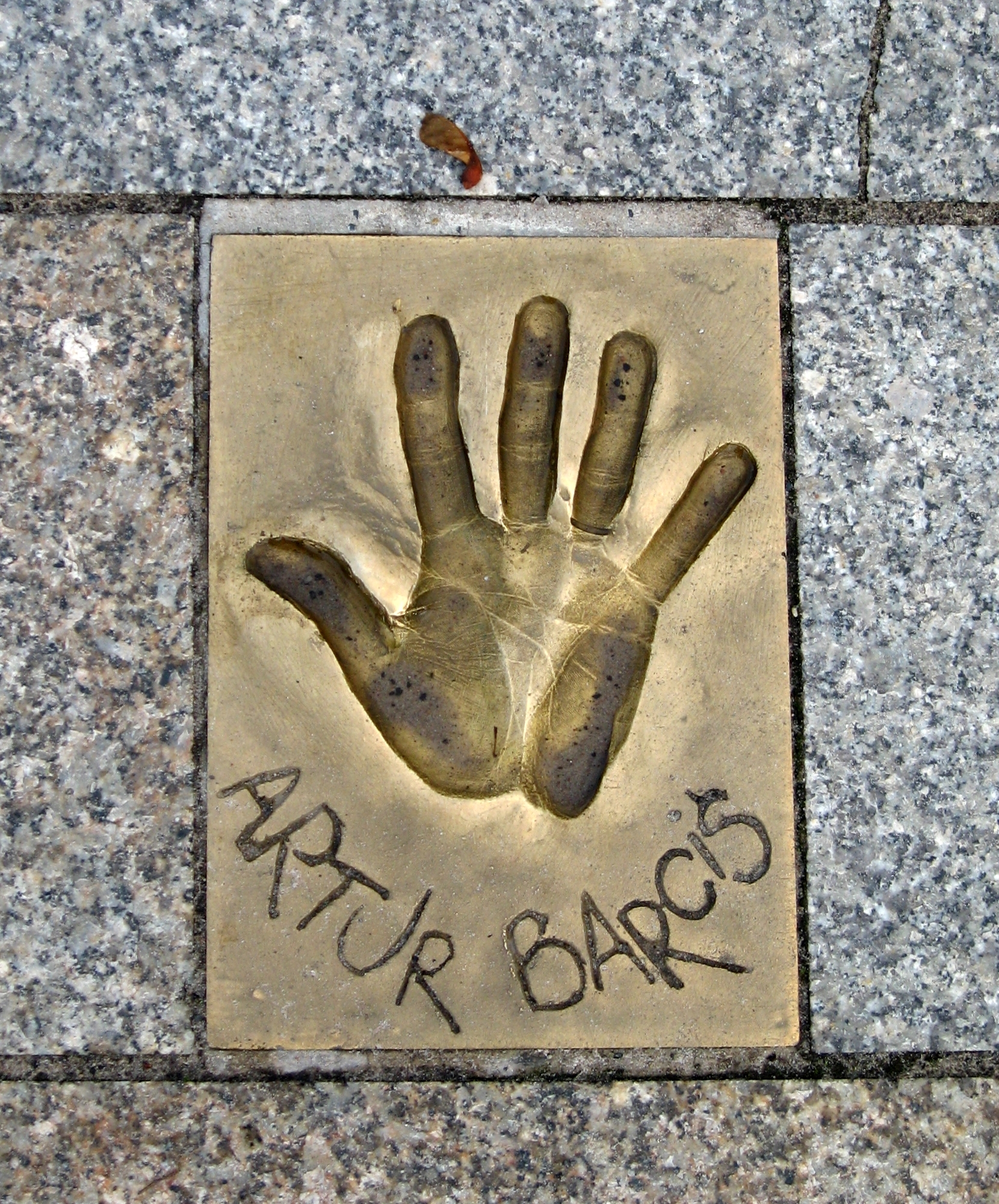 Aleja Gwiazd w Międzyzdojach - Artur Barciś